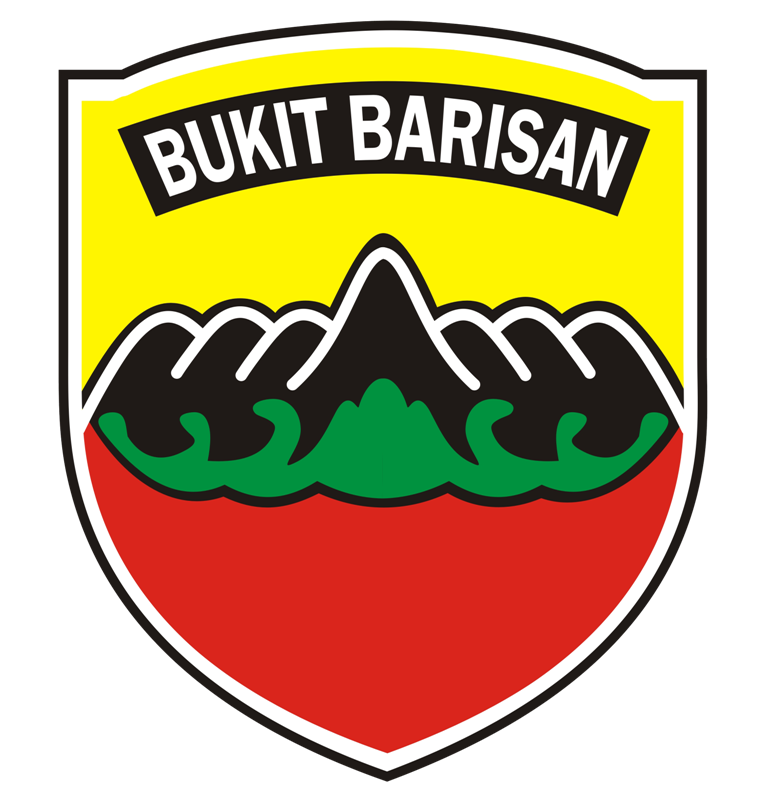 Gambar ini adalah Lambang Kodam I/Bukit Barisan